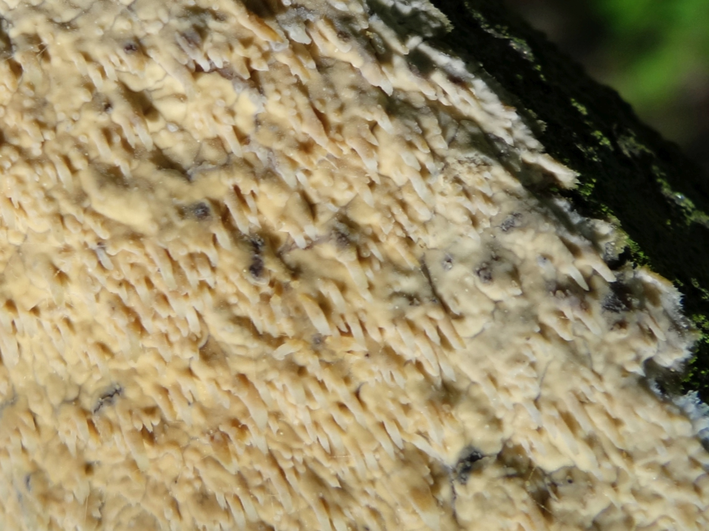 Hyphodontia quercina (location: Poland, Pogórze Rożnowskie, park dworski w Jeżowie (miejscowość Wilczyska)